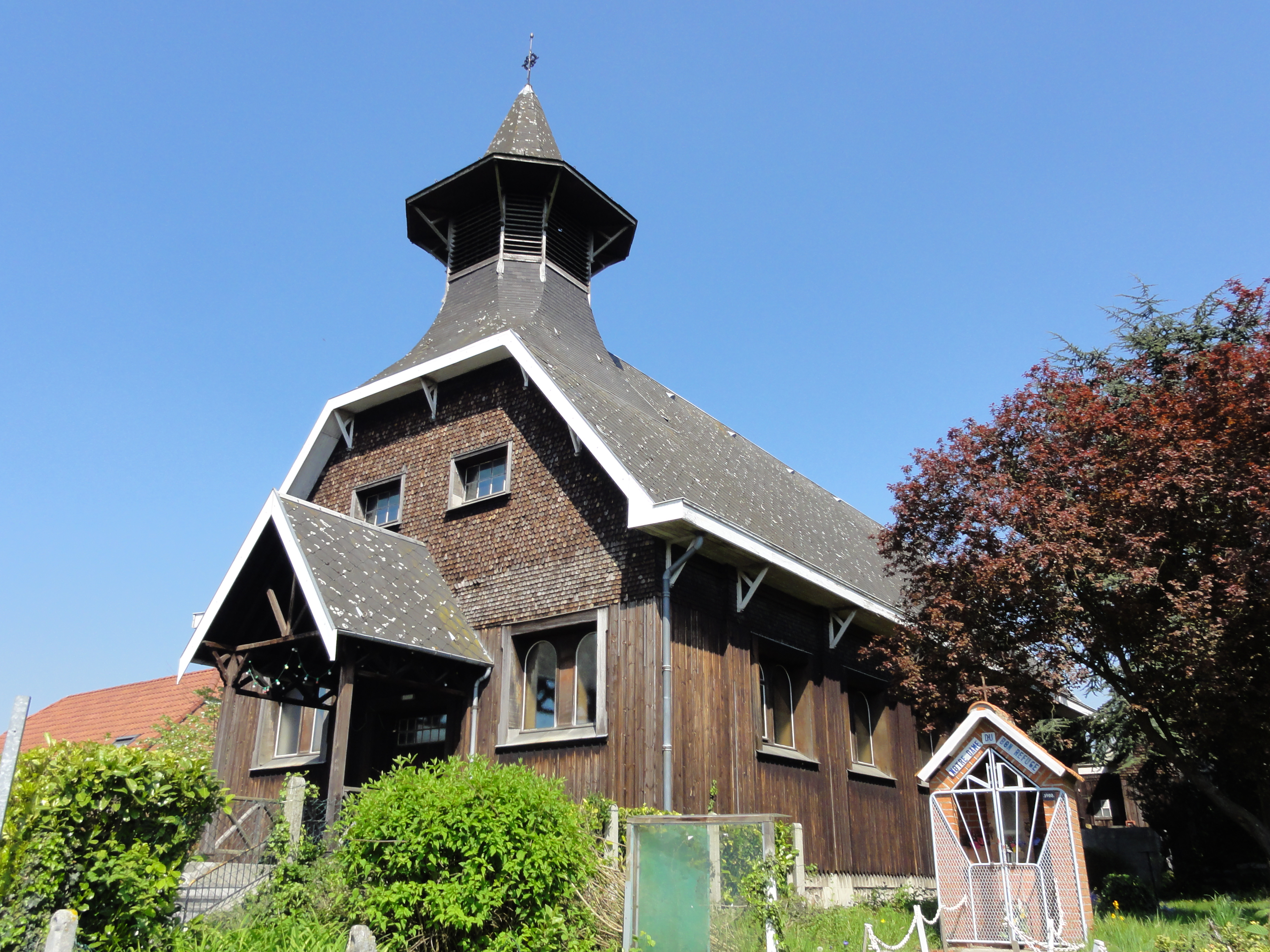 Église Sainte-Cécile et son presbytère des cités de la fosse Sabatier de la Compagnie des mines d'Anzin, Raismes, Nord, Nord-Pas-de-Calais, France. L'église est inscrite aux monuments historiques le 1er décembre 2009 et inscrite sur la liste du patrimoine mondial de l'Unesco le 30 juin 2012 et y constitue en partie le site no 8.